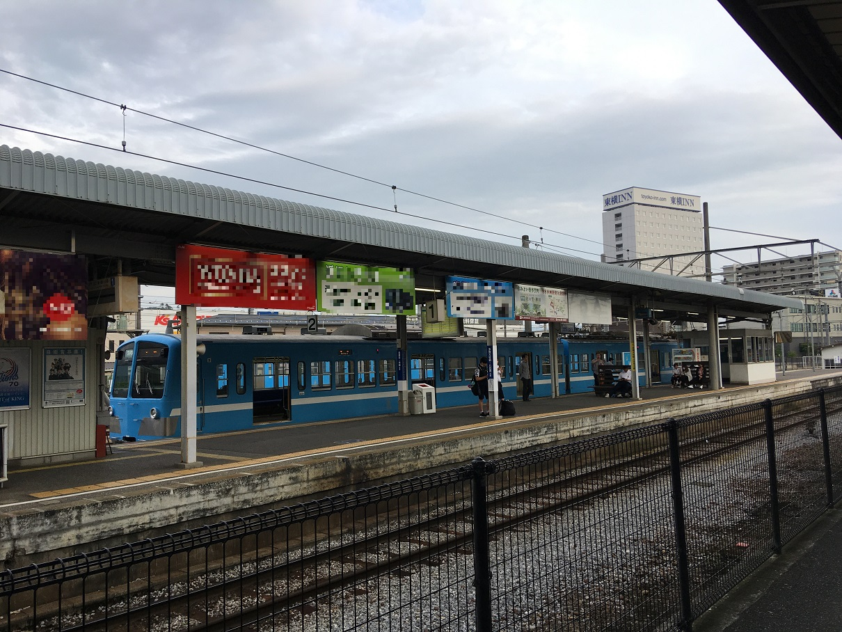 近江鉄道彦根駅ホーム